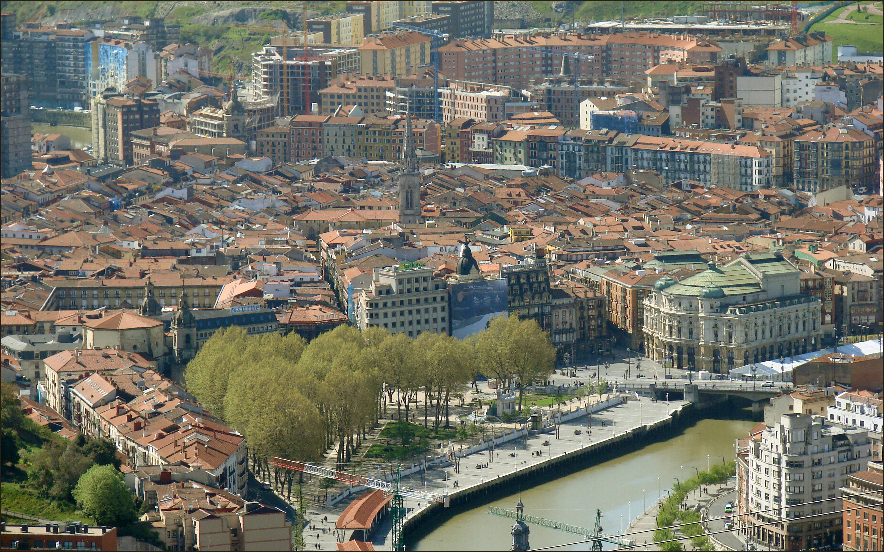 Vers la moitié du XVème siècle, le Casco Viejo (Vieille Ville) existait déjà, la partie la plus ancienne s´était étendue grâce à l'ajout de quatre rues, ce qui a donné naissance aux "Siete Calles" (Sept rues), nom qui désigne le centre historique de Bilbao. Dans la même zone la Cathédrale de Santiago, a été construite, en remplacement de l'Ermitage consacré à l'Apôtre Saint-Jacques. La croissance économique s'est ralentie vers la fin du XVIème siècle et tout au long du XVIIème, mais le développement urbain ne s'est pas arrêté. Les rues Bidebarrieta et Correo ont permis l'expansion de Bilbao vers l'Arenal, qui deviendra le centre de la vie sociale de la ville, au 19ème siècle, avec la construction de la Mairie et du théâtre Arriega.